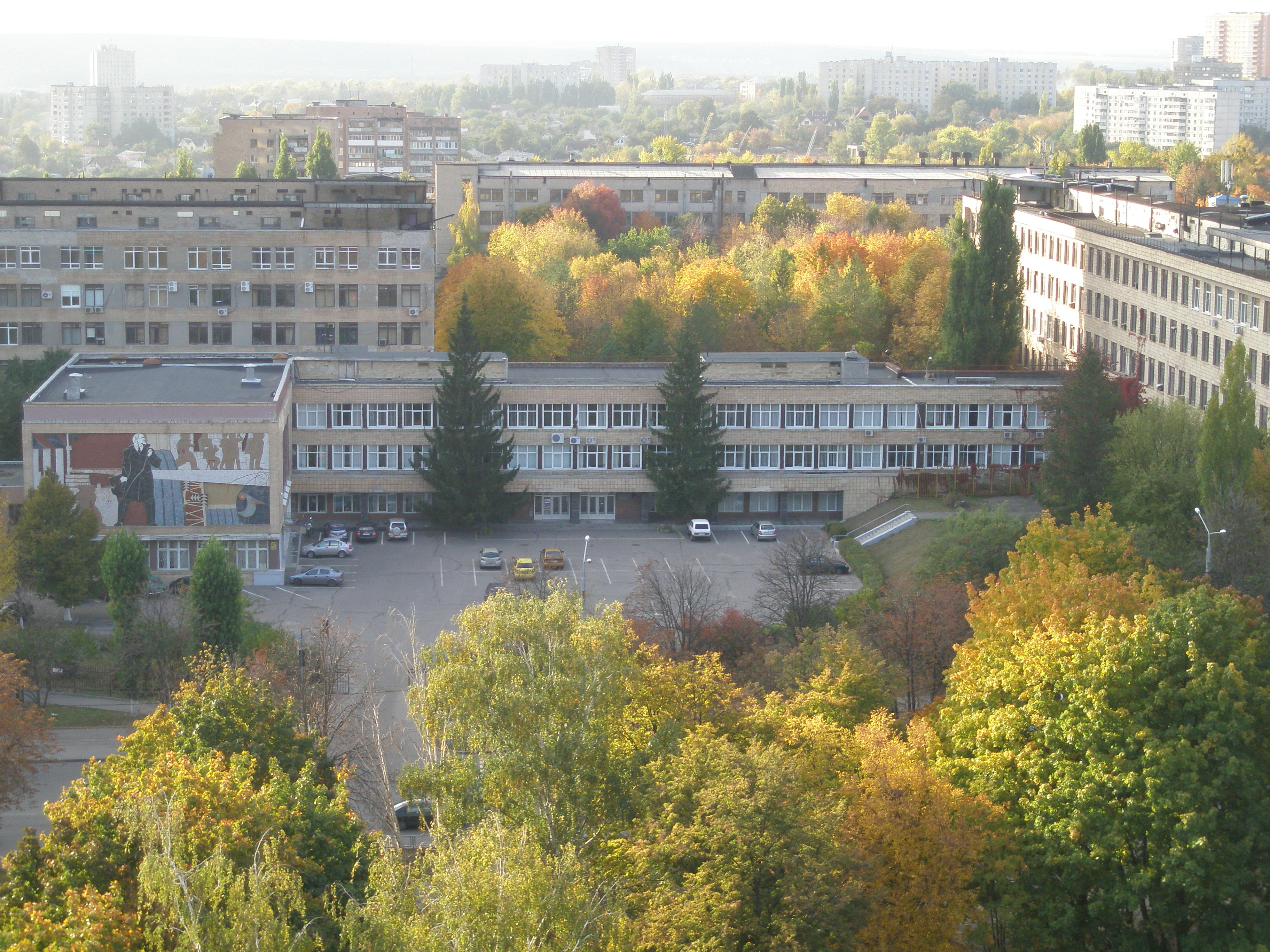 Физико-технический институт низких температур имени Б. И. Веркина. Харьков.